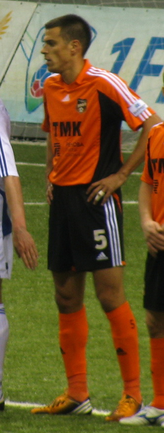 сербский футболист Милан Вьештица в составе "Урала"